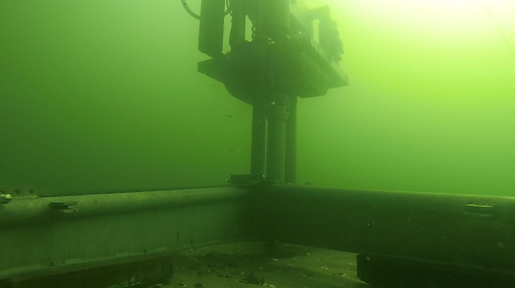 Gestellfuss und Vibrationseinheit an Führungsrohren. Das Kernrohr für die Sedimentaufnahme befindet sich bereits fast vollständig im Meeresboden